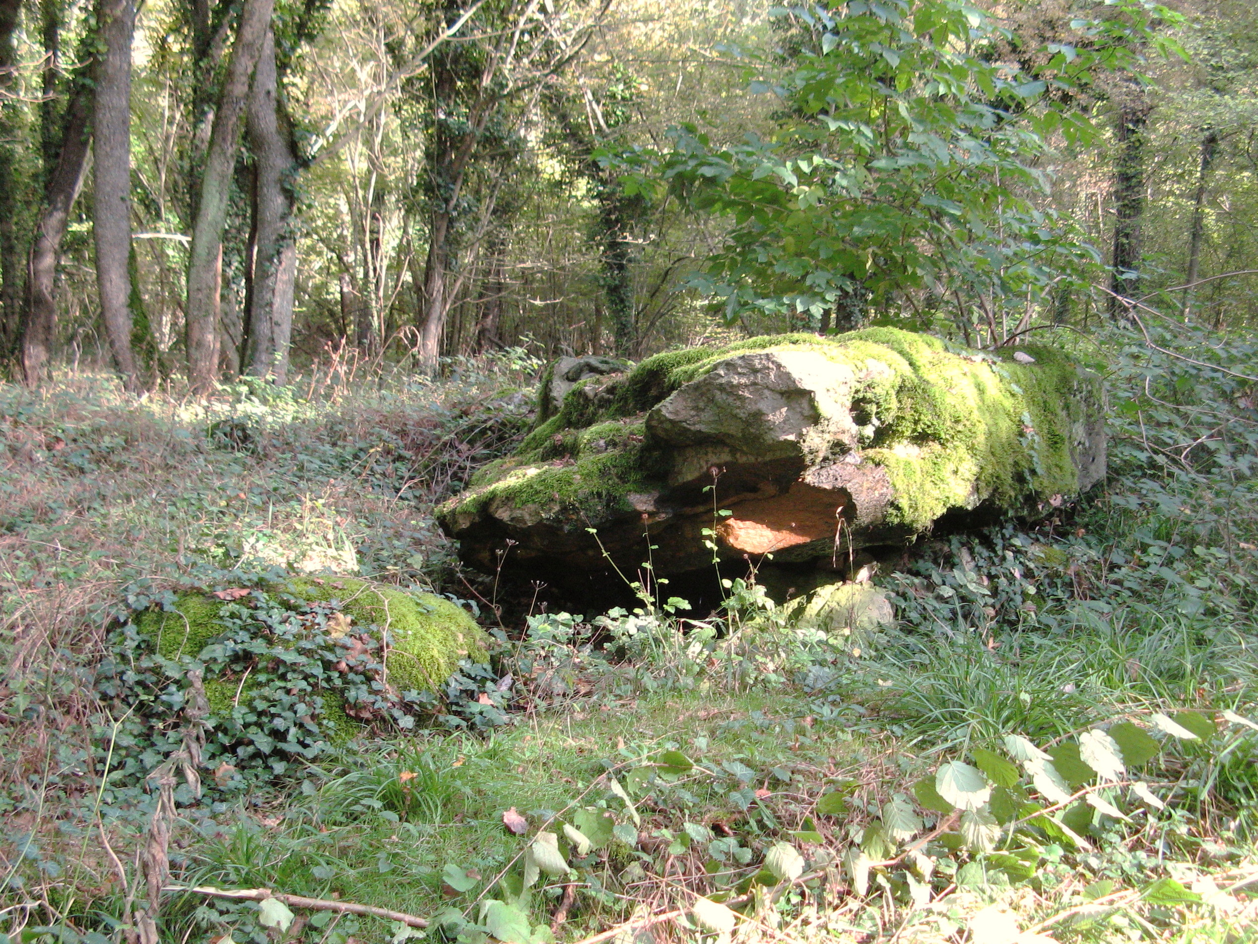 Saint-Maurice-aux-Riches-Hommes : grand dolmen de Treinel .